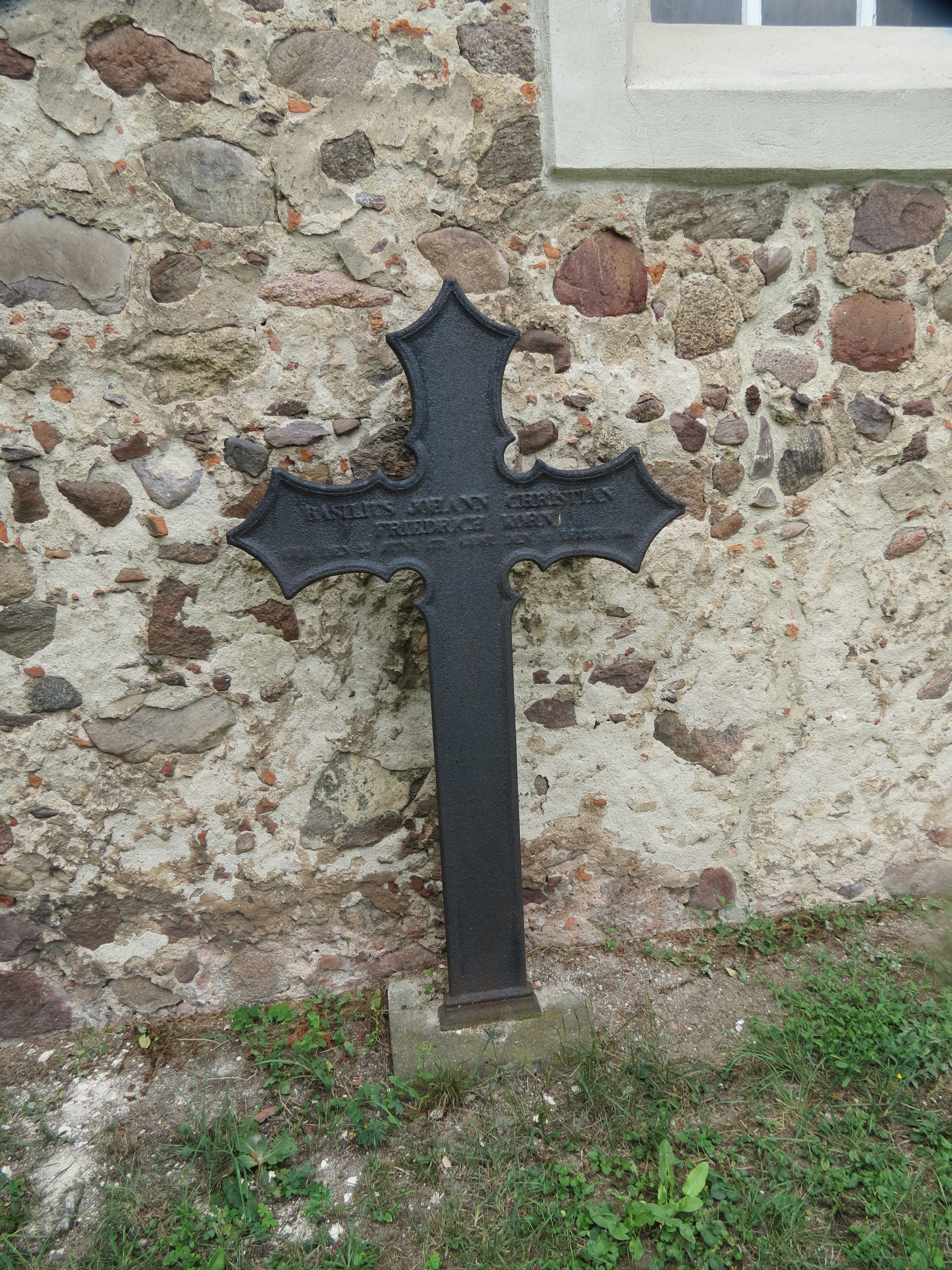 Grabkreuz des Basilius Johann Christian Friedrich Korn an der Ostseite der Dorfkirche Laubst, Ortsteil der Stadt Drebkau, Landkreis Spree-Neiße, Brandenburg